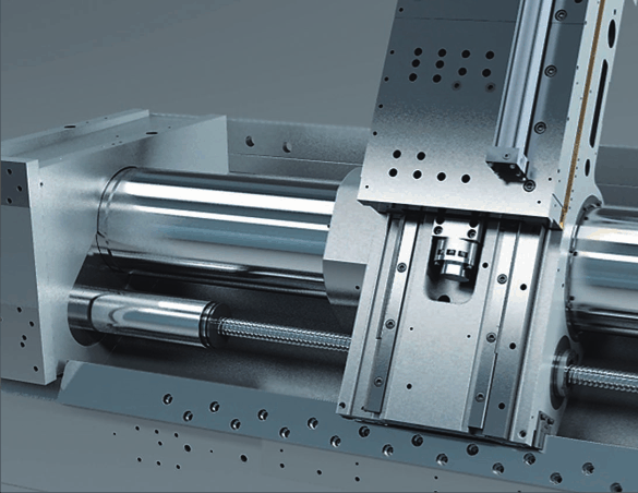 Гидростатическая направляющая